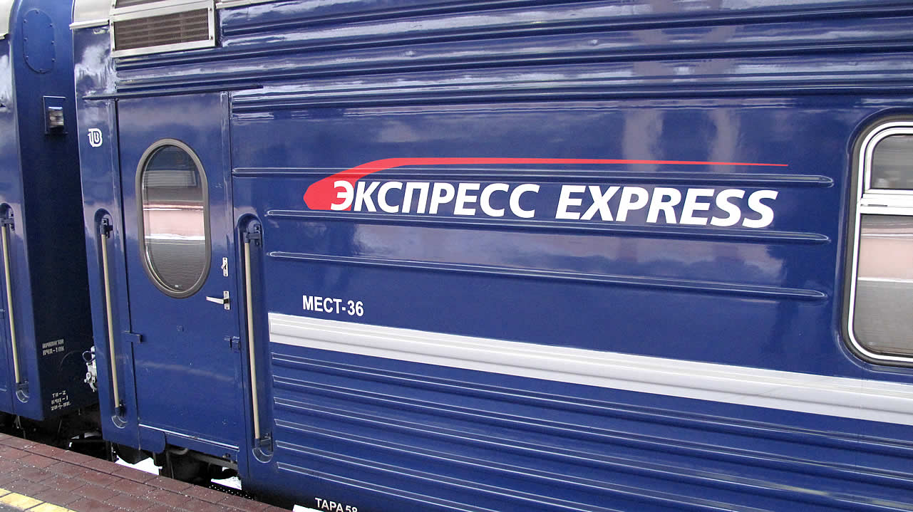 Фото поезда "Экспресс"